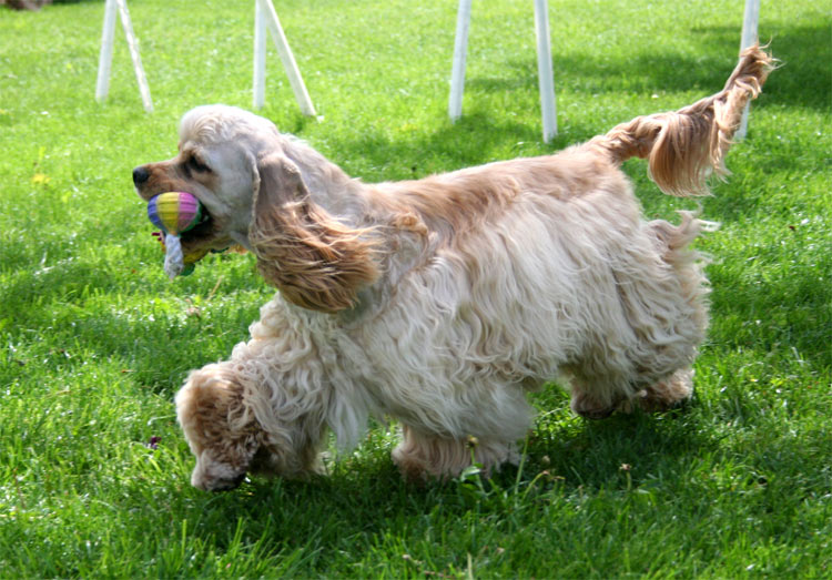 cocker américain blond